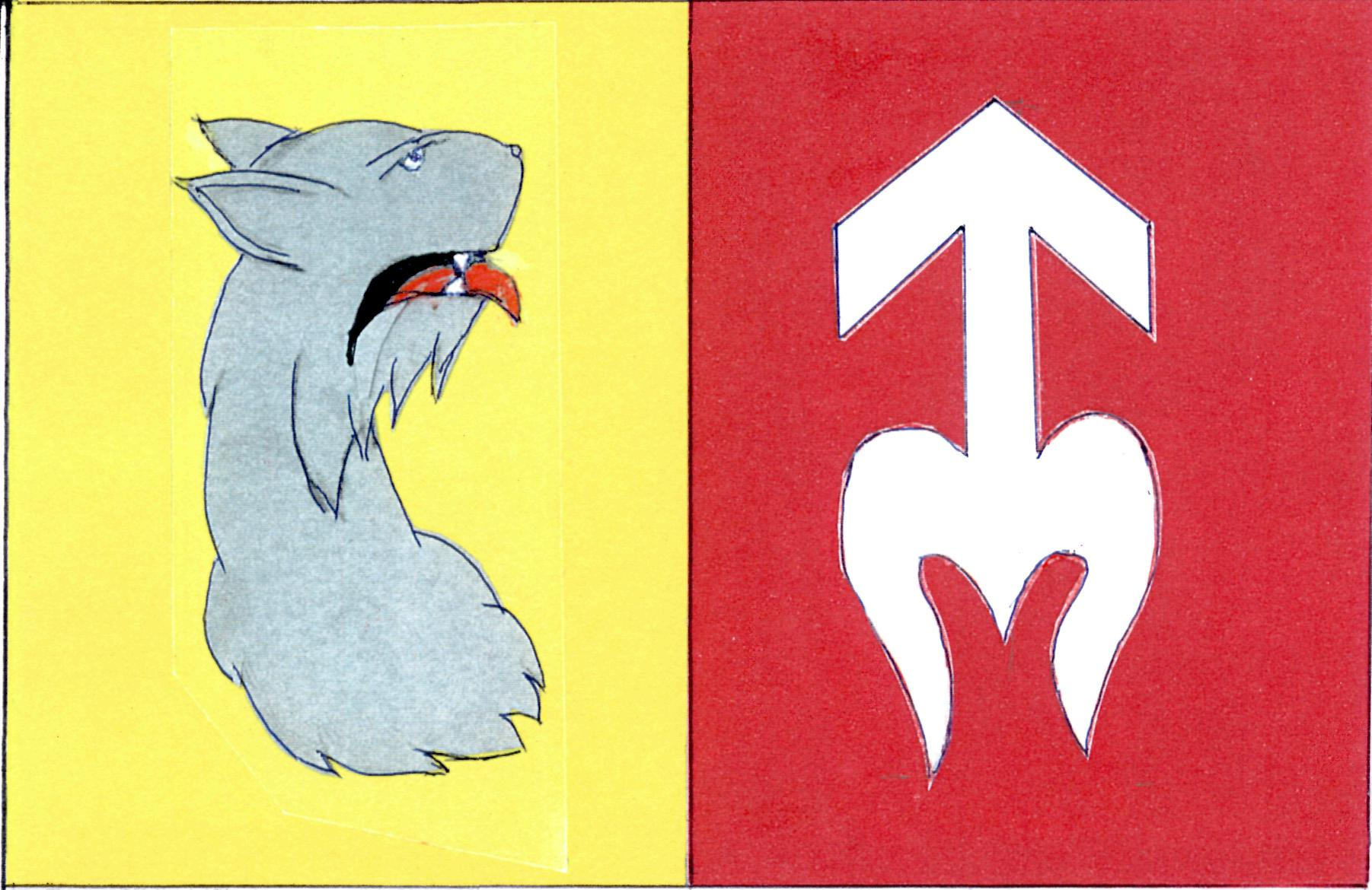 Vlajka obce Přestavlky u Čerčan